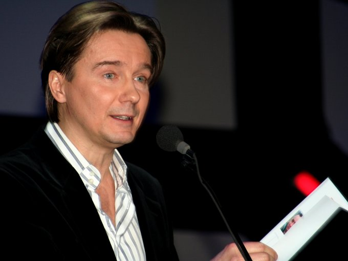 Mariusz Treliński, Polish director